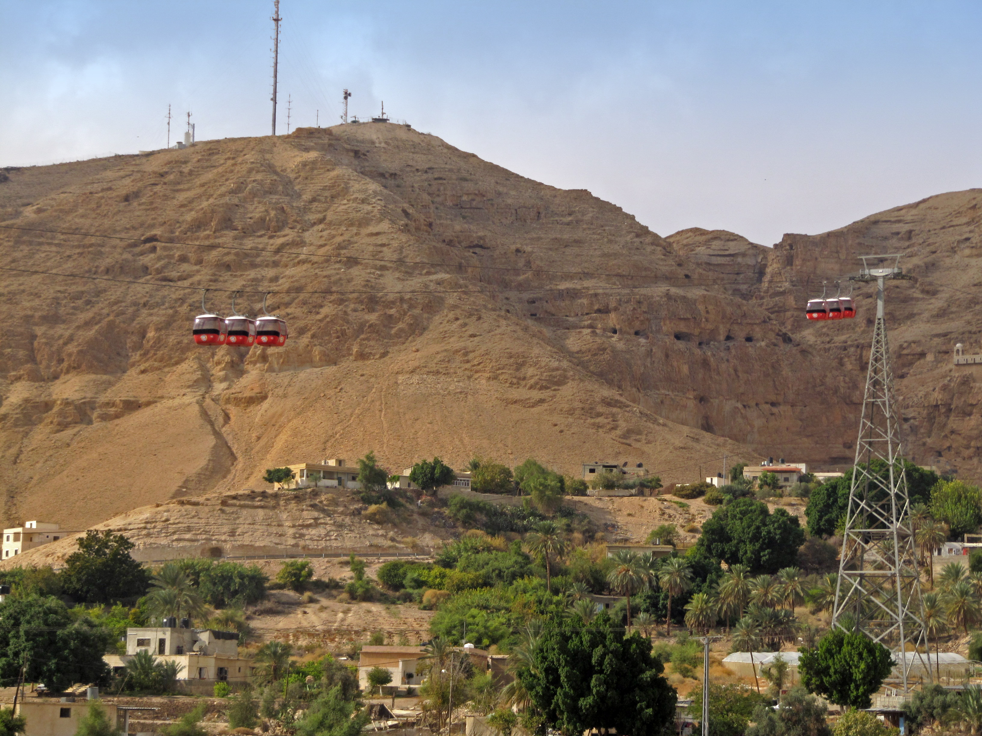 Jericho (more details in the photo's title) יריחו (מידע נוסף בשם הקובץ)